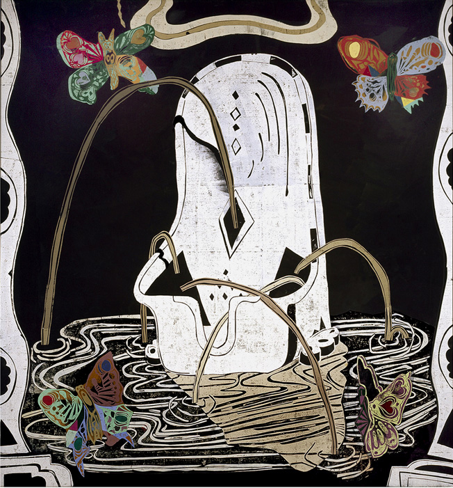 Abbildung des Bildes "Ausleben"